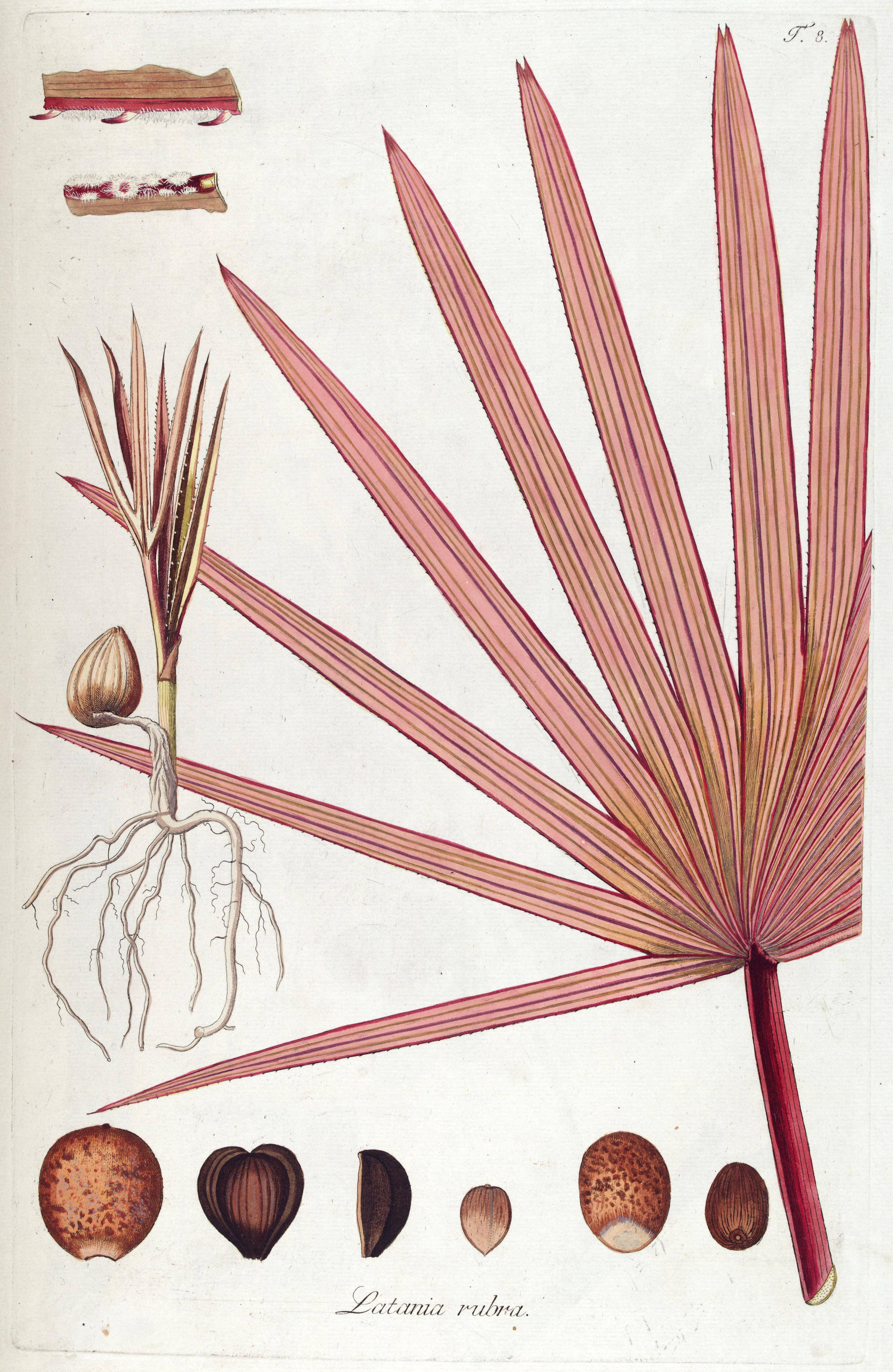 Fragmenta botanica, figuris coloratis illustrata :ab anno 1800 ad annum 1809 per sex fasciculos edita /opera et sumptibus Nicolai Josephi Jacquin.